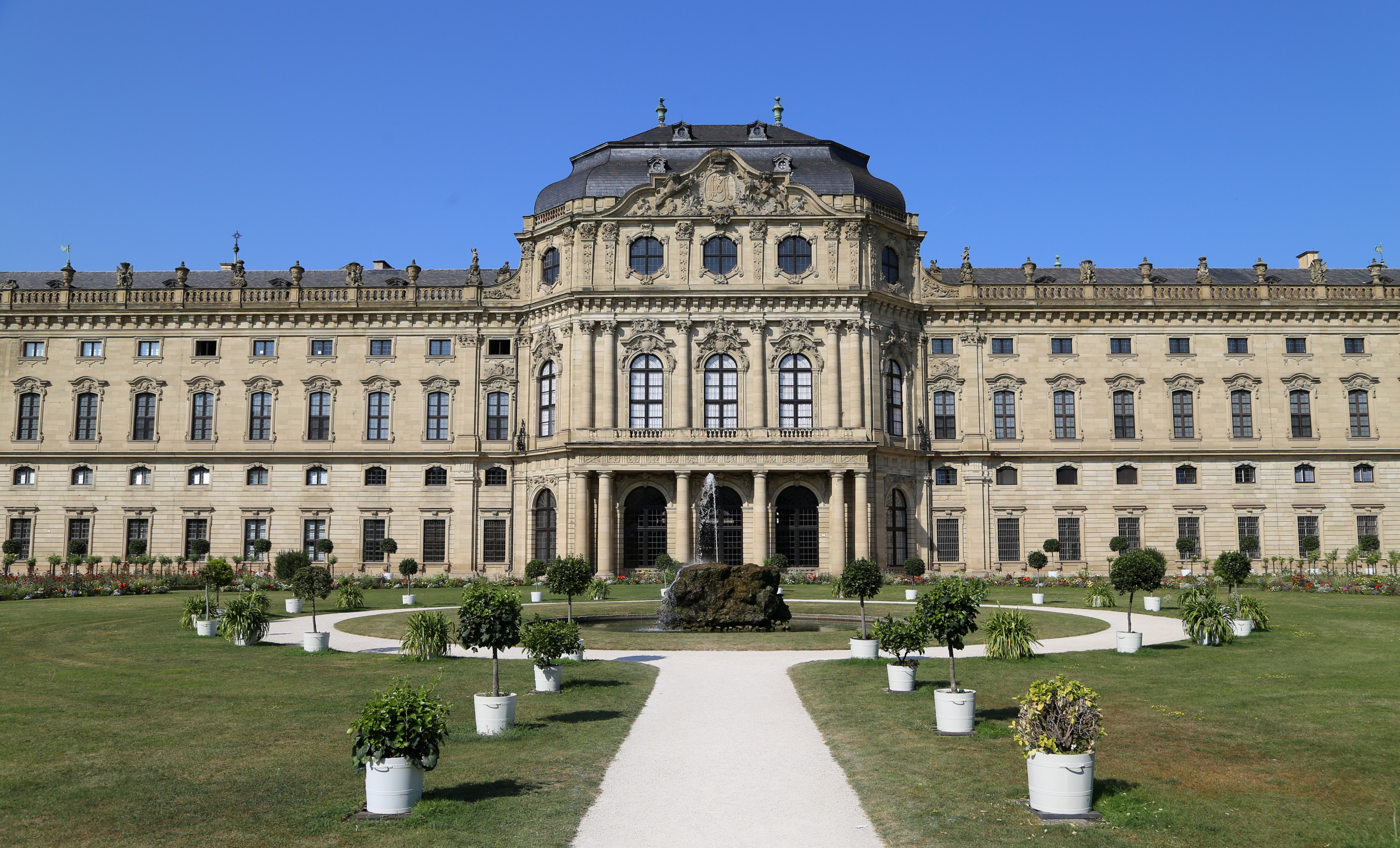 Würzburger Residenz mit Hofgarten